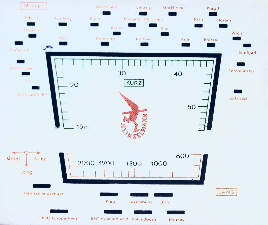 GLAM im Deutschen Museum Bonn, Senderanzeige des Heinzelmannradios